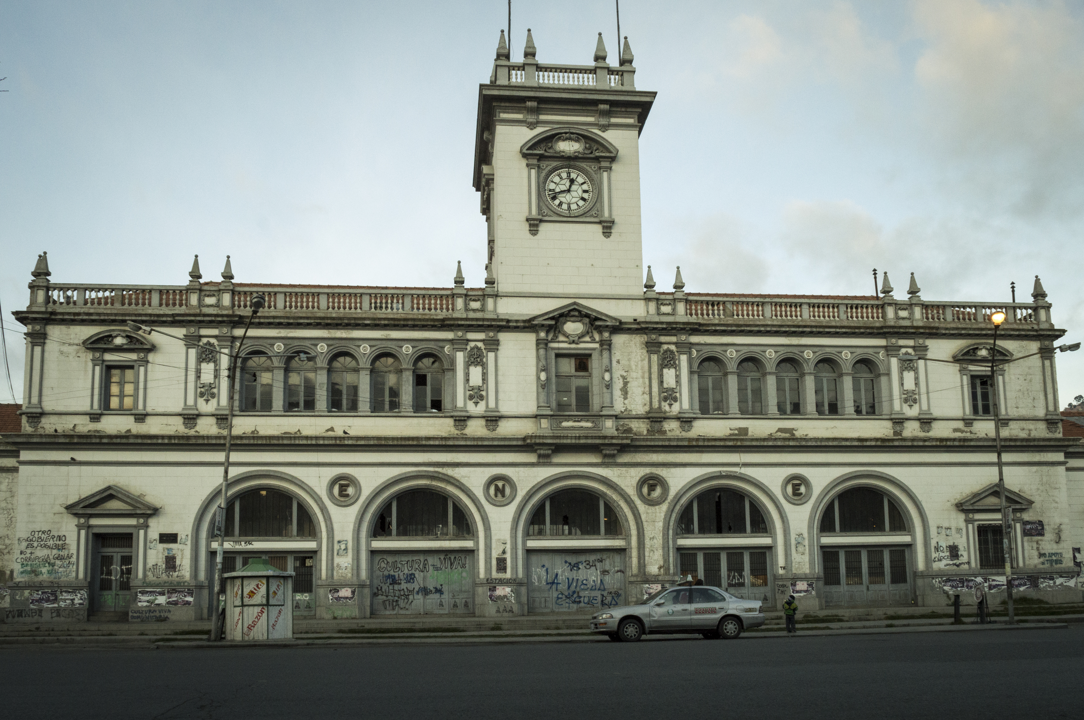 Estación ENFE La Paz - Bolivia This medium shows the protected monument with the number L/00-001 in Bolivia.